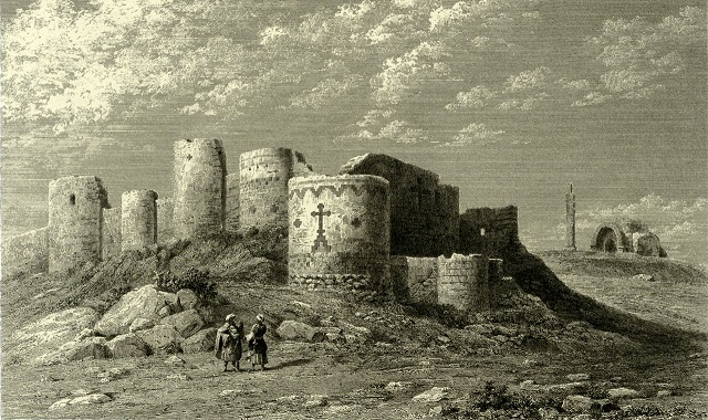 Rempart de l'enceinte de l'ancienne forteresse d'Ani de l'ancien royaume d'Arménie. Augustin François Lemaître (1795-1870)